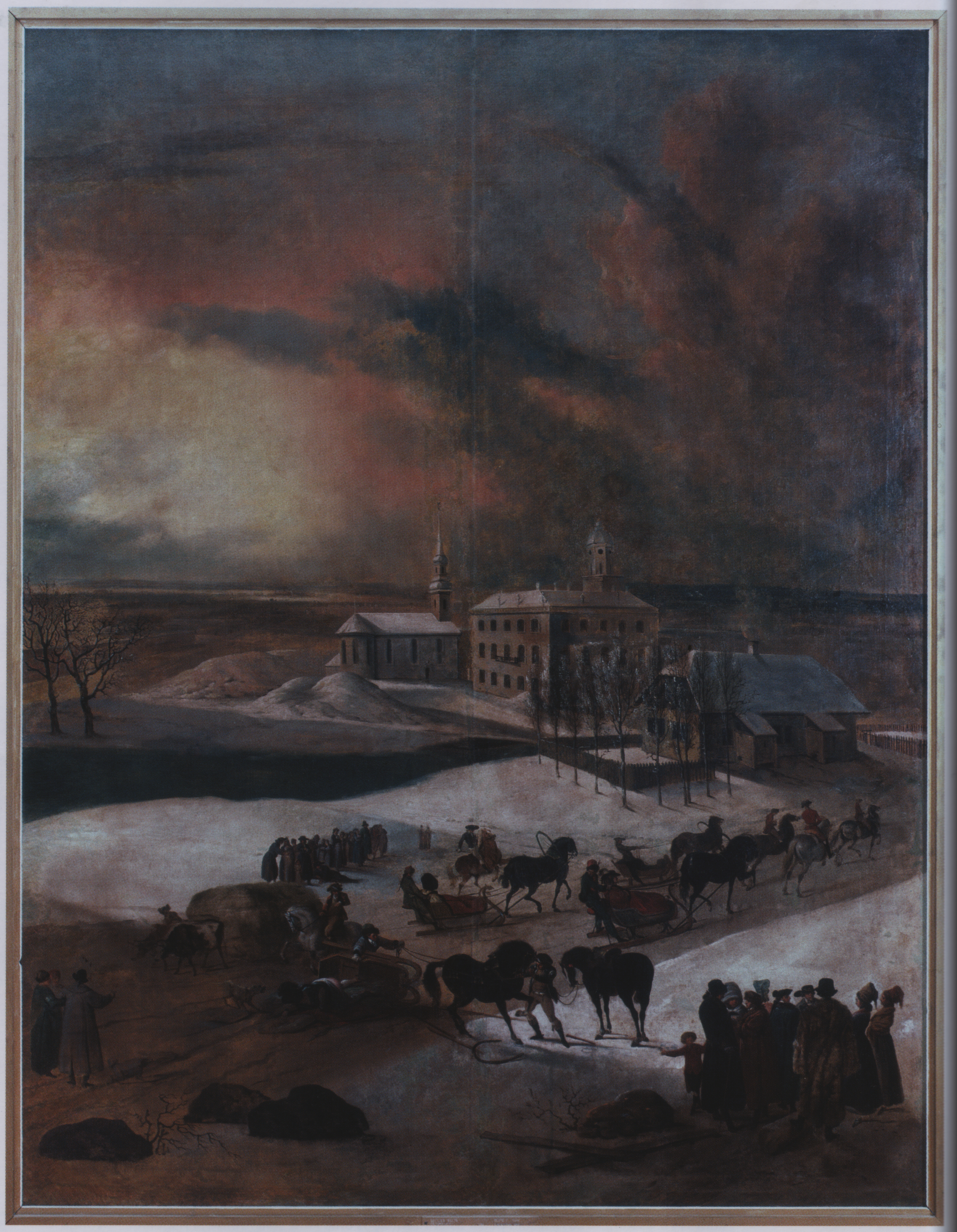 Põltsamaa lossi talvine vaade